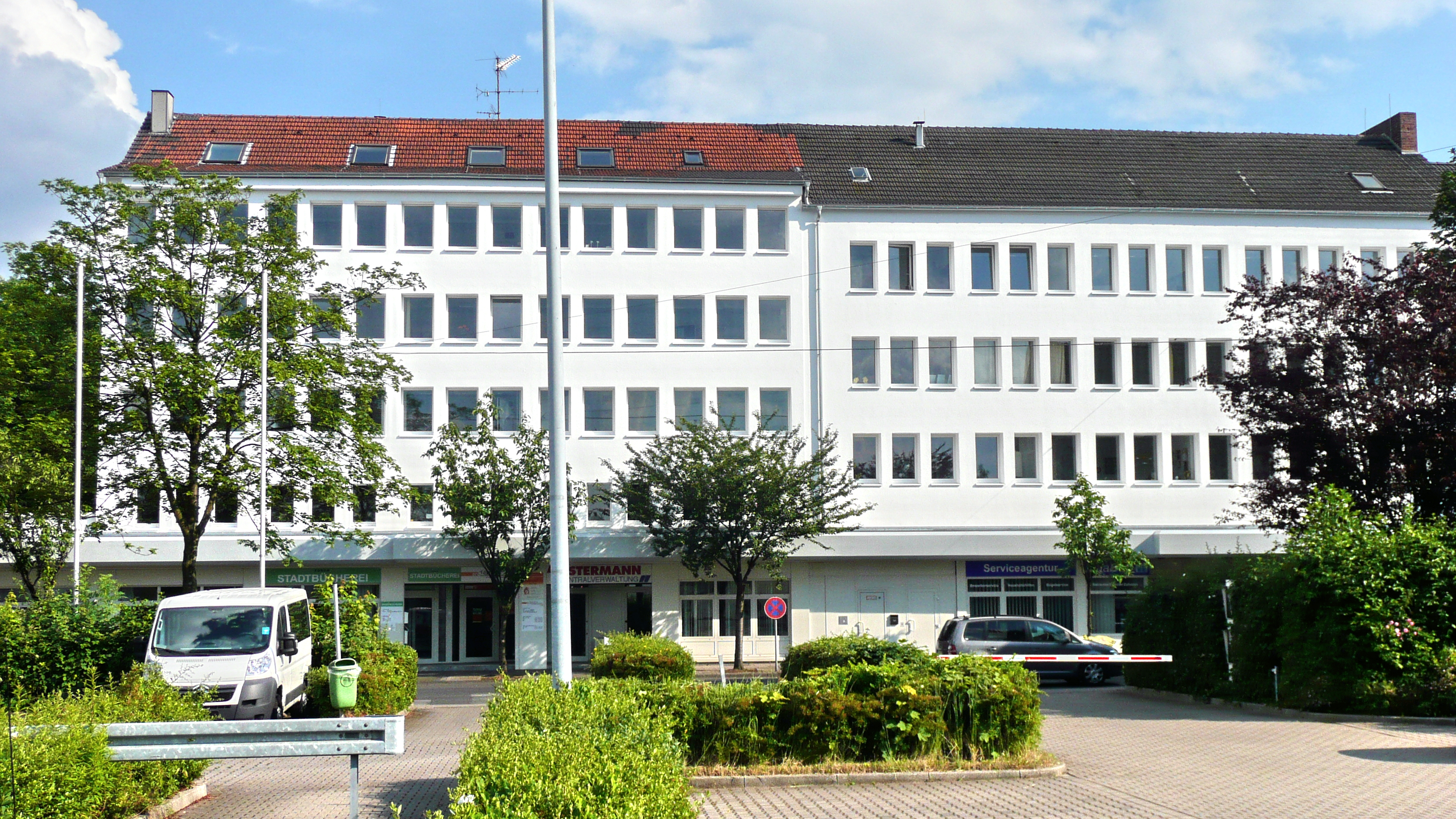 Annenstraße, Stammhaus des Handelsunternehmens Ostermann, beherbergt heute dessen Zentralverwaltung, verschiedene Behörden der Stadt Witten, einen gemeinnützigen Baumarkt in krichlicher Trägerschaft, eine Zweigstelle der Stadtbücherei sowie das Seminarzentrum des Volkshochschulzweckverbandes Witten-Wetter-Herdecke